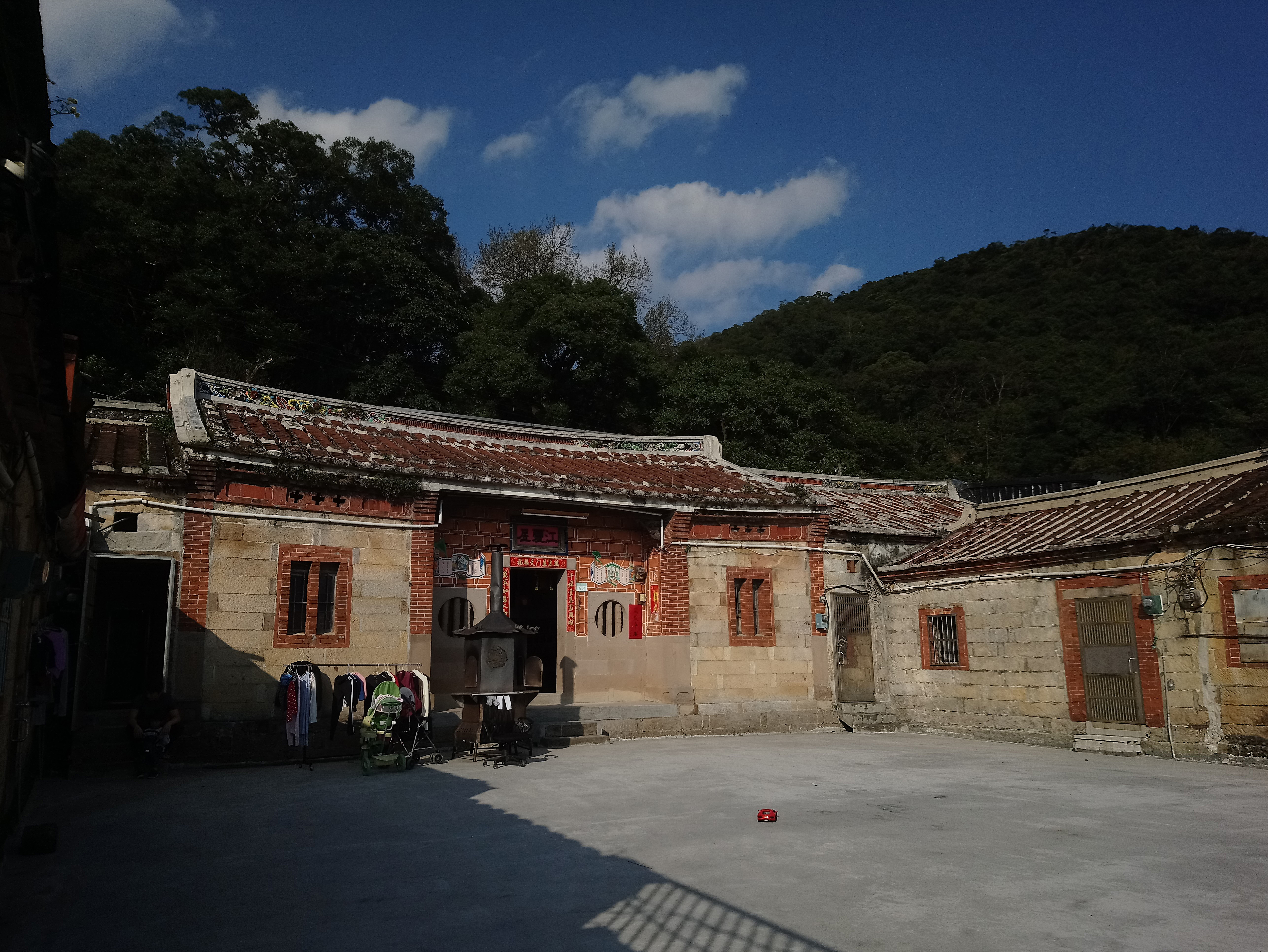 石崁黃氏古宅,台北市內湖區金龍次分區碧山里